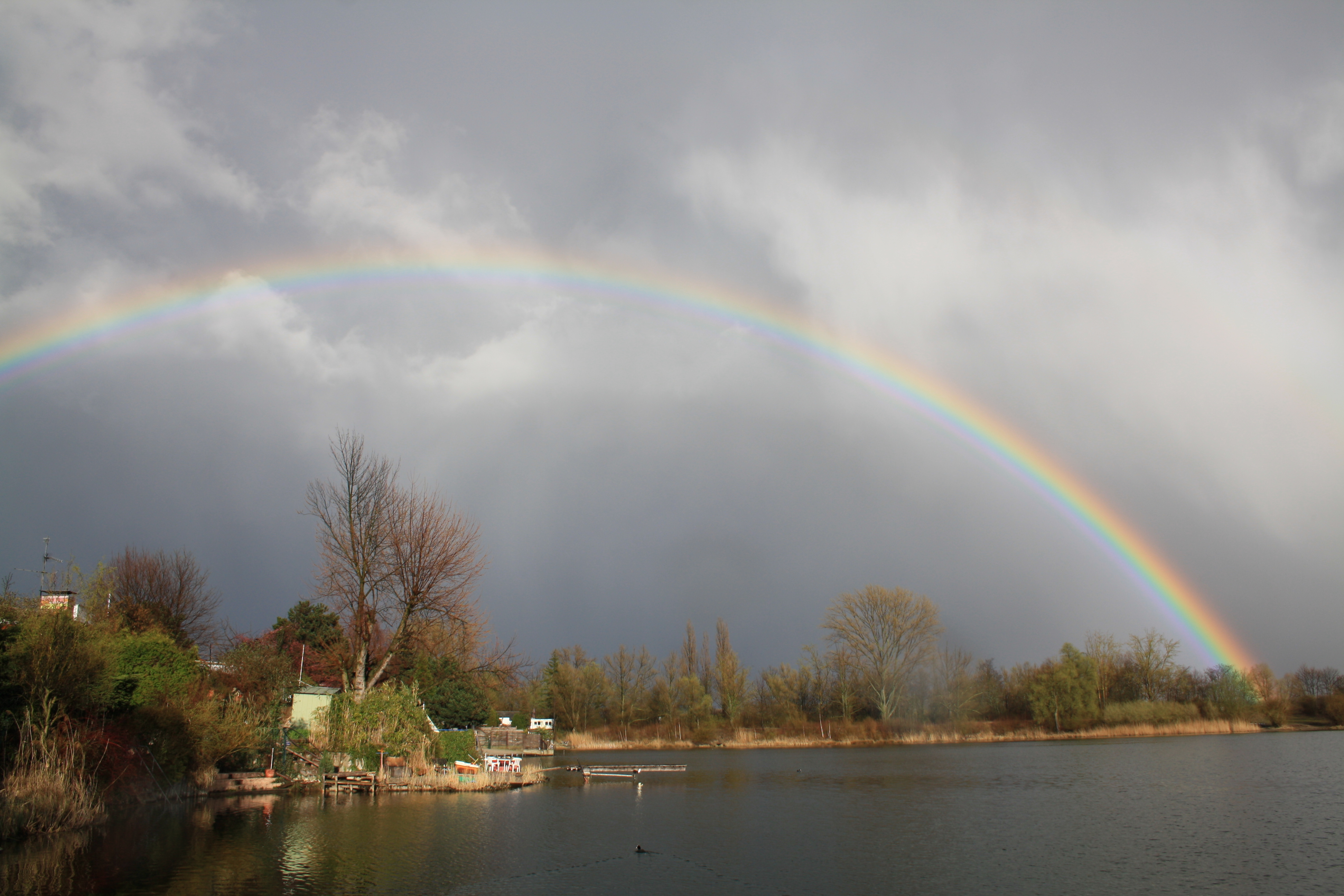 Regenbogen über dem Sonnensee, Binsfeld, Speyer, Deutschland